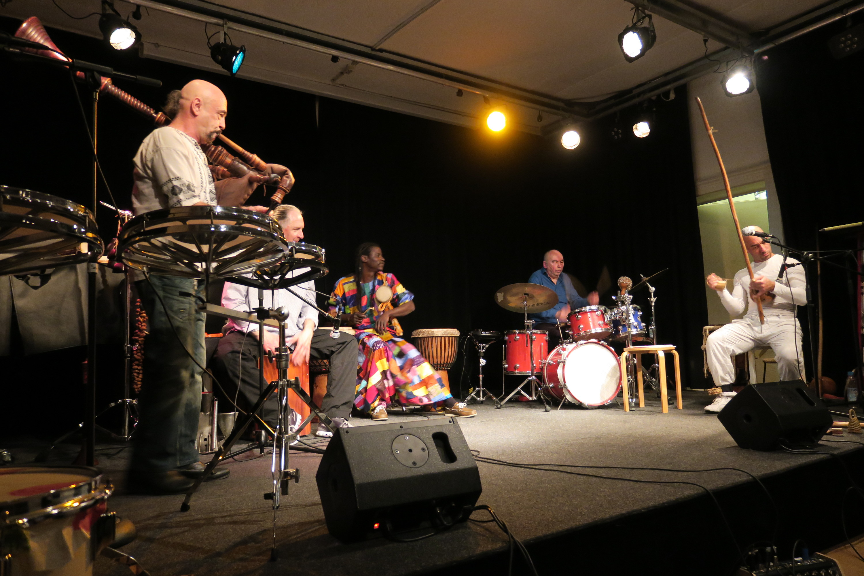 Ensemble "In Farbe", Konzert "Percussion Arts - In Farbe", 2017-03-17, Freies Musikzentrum München. Von links nach rechts: Thomas Gundermann (Sackpfeife, Flöten, Percussion), Charly Böck (Cajon, Percussion), Massaer Diouf (Percussion, Tanz), Rudolf Roth (Schlagzeug, Percussion, Stocktanz), Sabià Senzaleiro (Berimbau, Percussion, Capoeira)